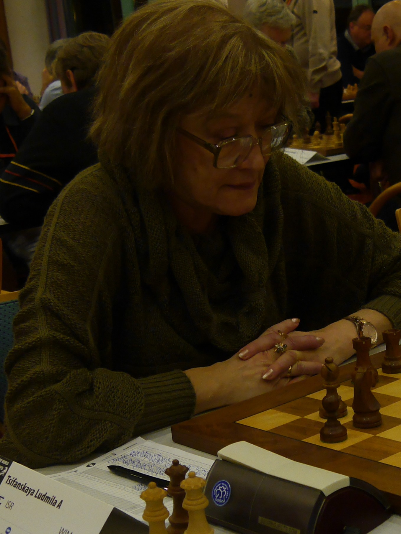 Ludmila Tsifanskaya, Schachweltmeisterschaft der Senioren 2016 in Marienbad.